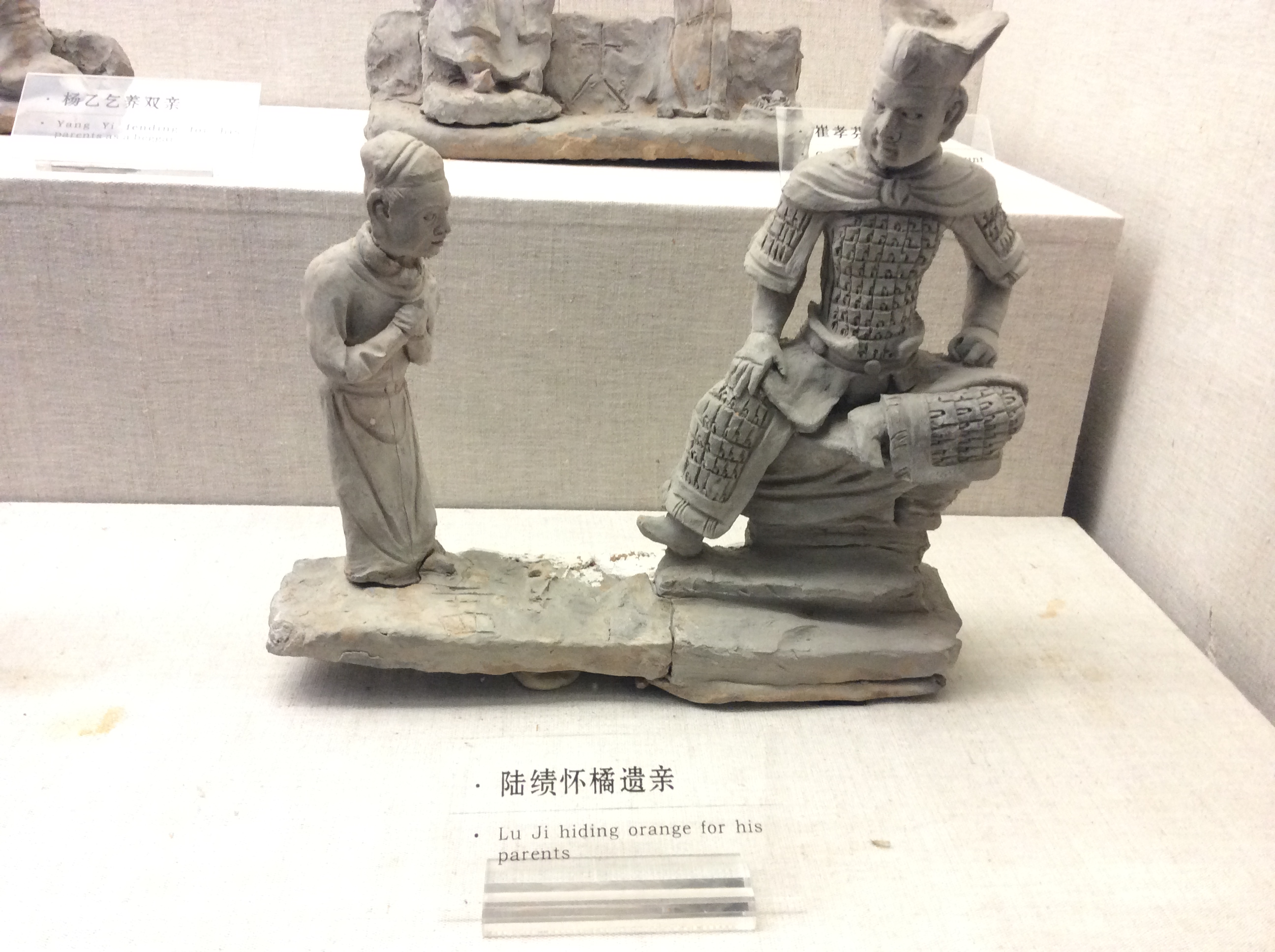 陸績懷橘遺親